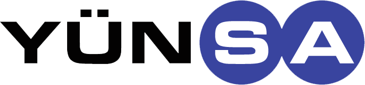 Yünsa Yünlü Sanayi Anonim Şirketi